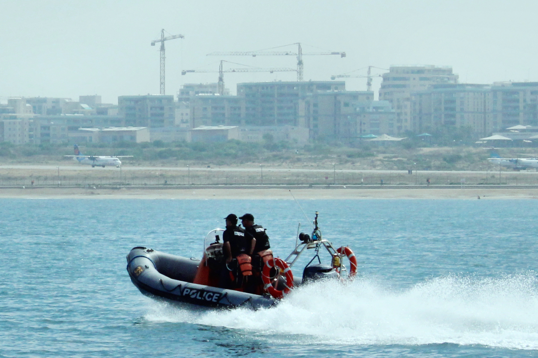 סירה של יחידת השיטור הימי מפטרלת מול חופי תל-אביב, מאי 2014.